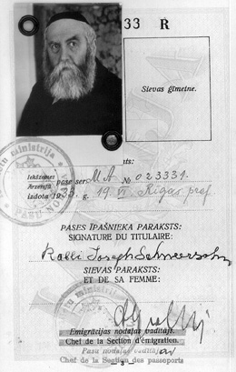 דרכון לטוי שהונפק בריגא, לאדמו״ר הרב יוסף יצחק שניאורסאהן מליובאוויטש, ב1933־06־19